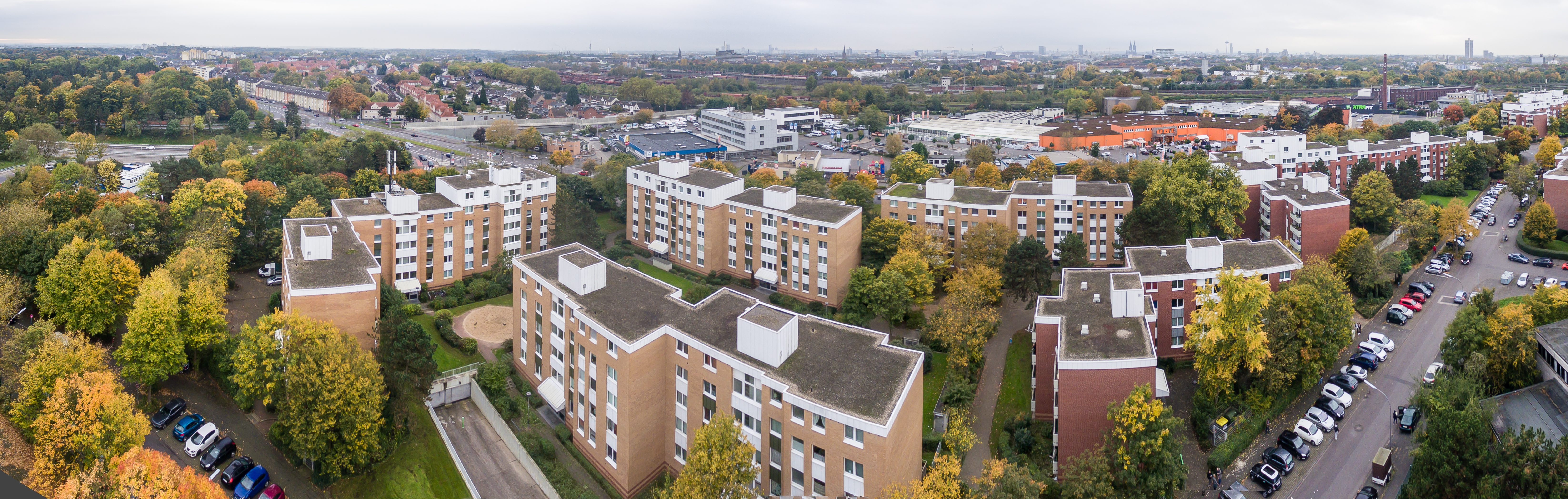 Wohnhäuser Modemannstraße, Köln-Buchheim. Im Besitz von Sahle Wohnen